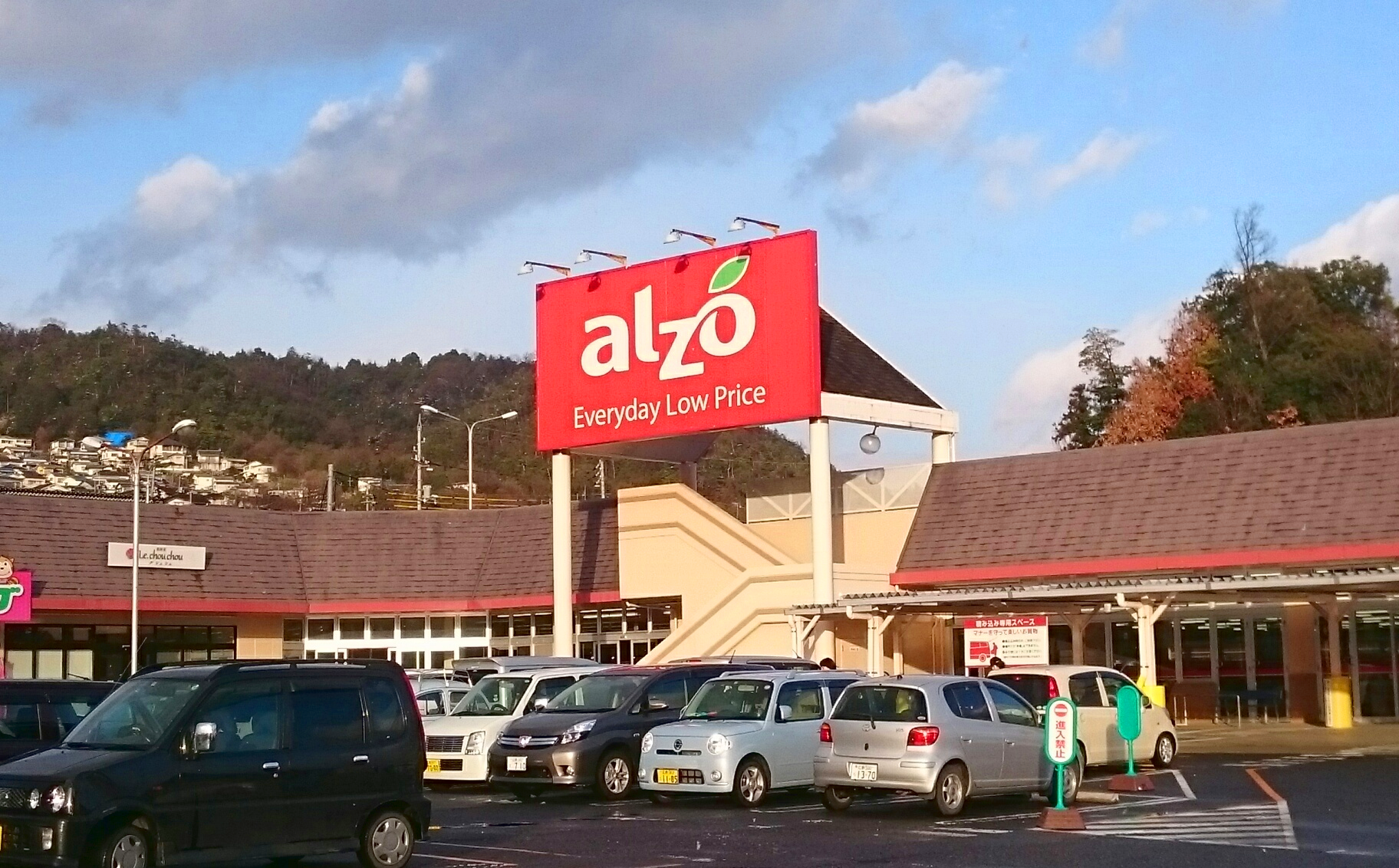 alzo可部店の画像です。